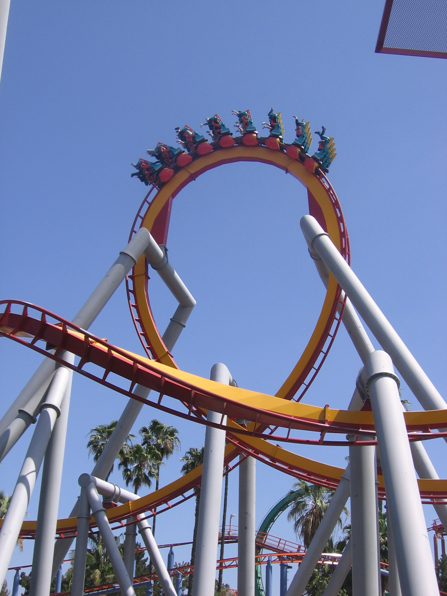 Silver Bullet , montagnes russes à Kings Dominion